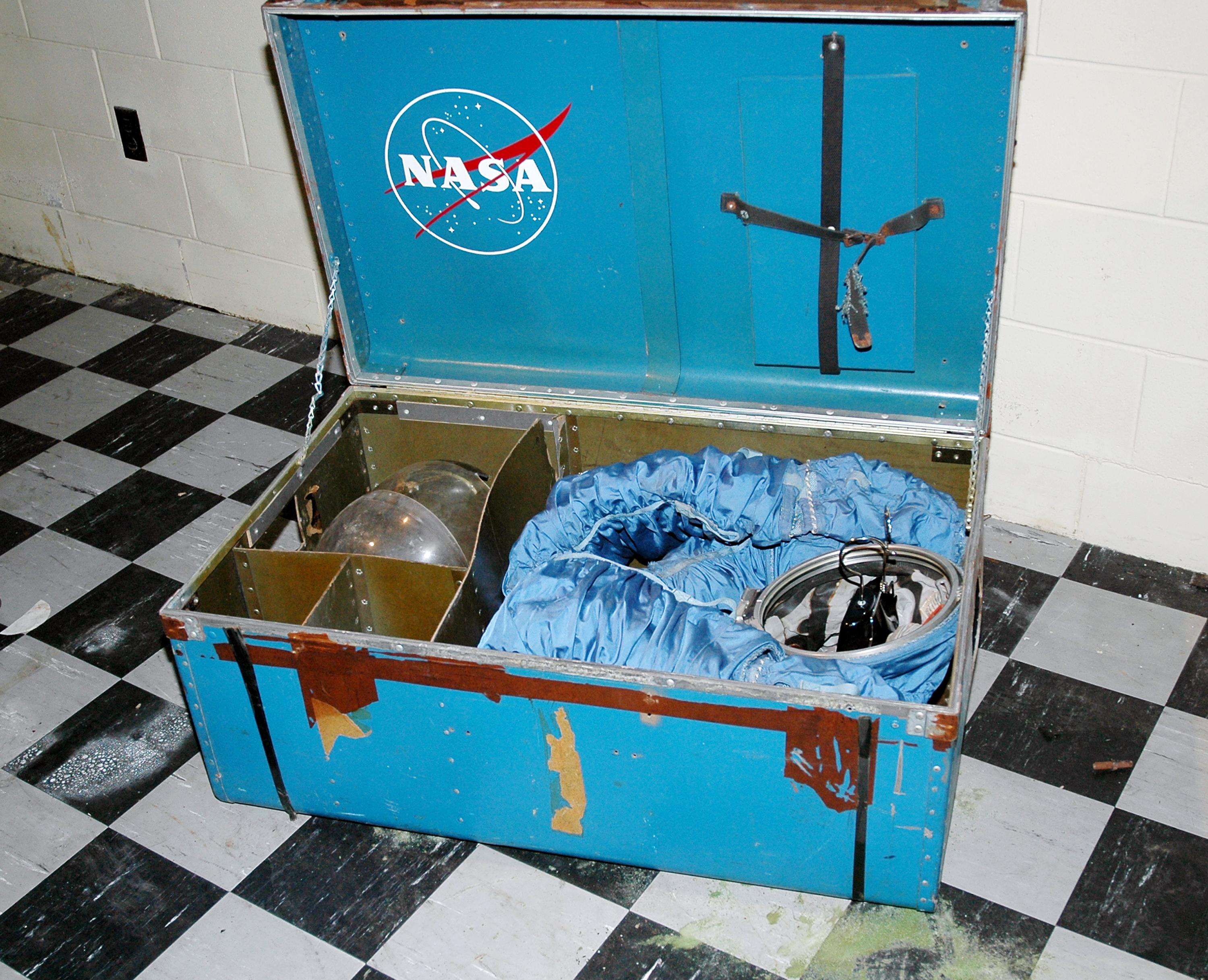 Der MOL-Anzug verpackt